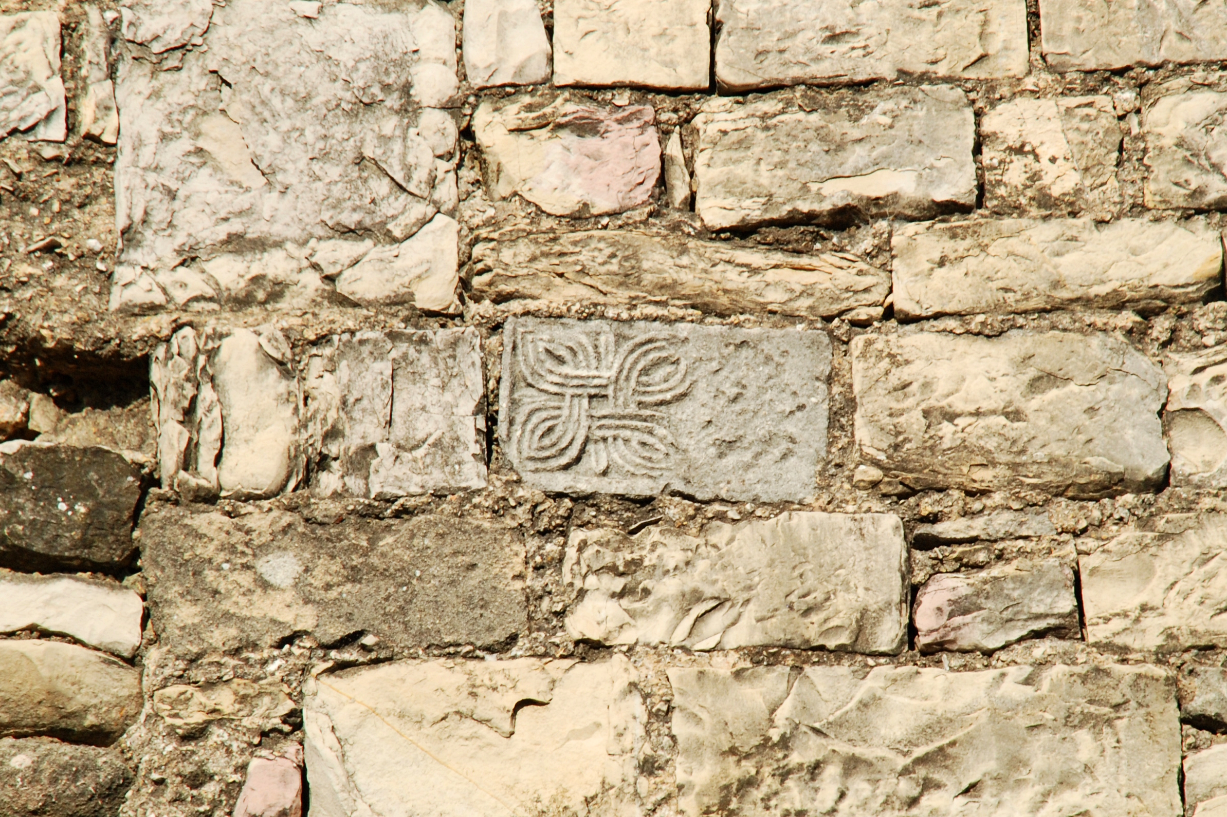 France - Gard - Église Notre-Dame et Saint-André de Congénies .